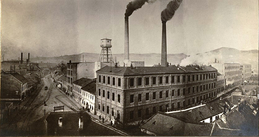 A Goldberger-textilgyár. - Budapest III. kerületében, Pacsirtamező utca – Perc utca – Lajos utca – Tímár utca által közrefogott területen állt.